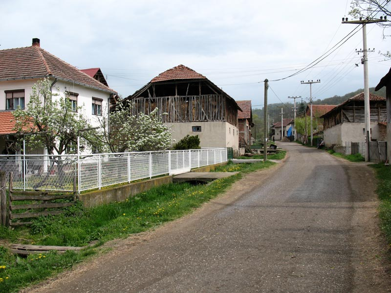 ulaz u malesevo Licensing Template:Јв-предато